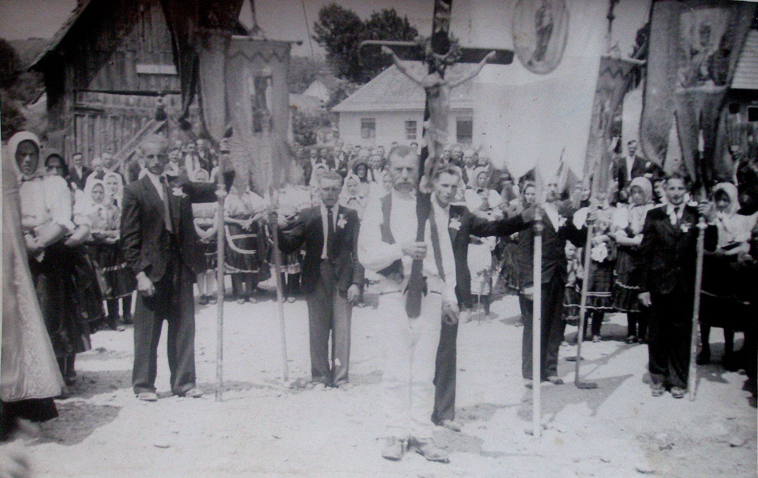 Digitalizovaný obrázok pôvodne pochádzajúci asi z roku 1942. Miestni veriaci pri procesii v strede dediny - na Valale.